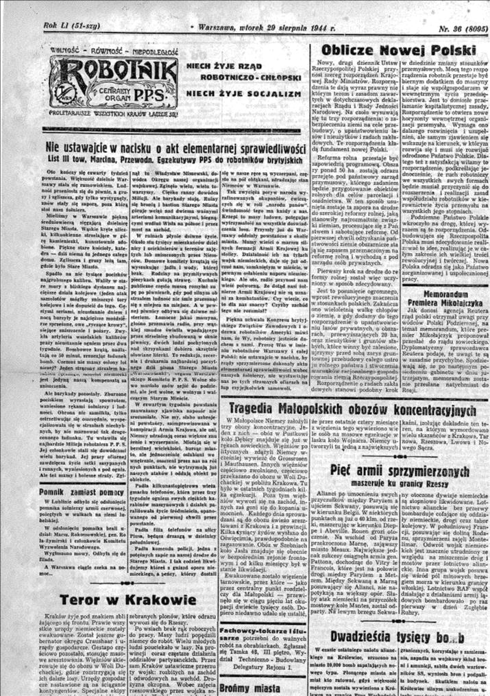 "Robotnik" PPS z Powstania Warszawskiego sierpień 1944